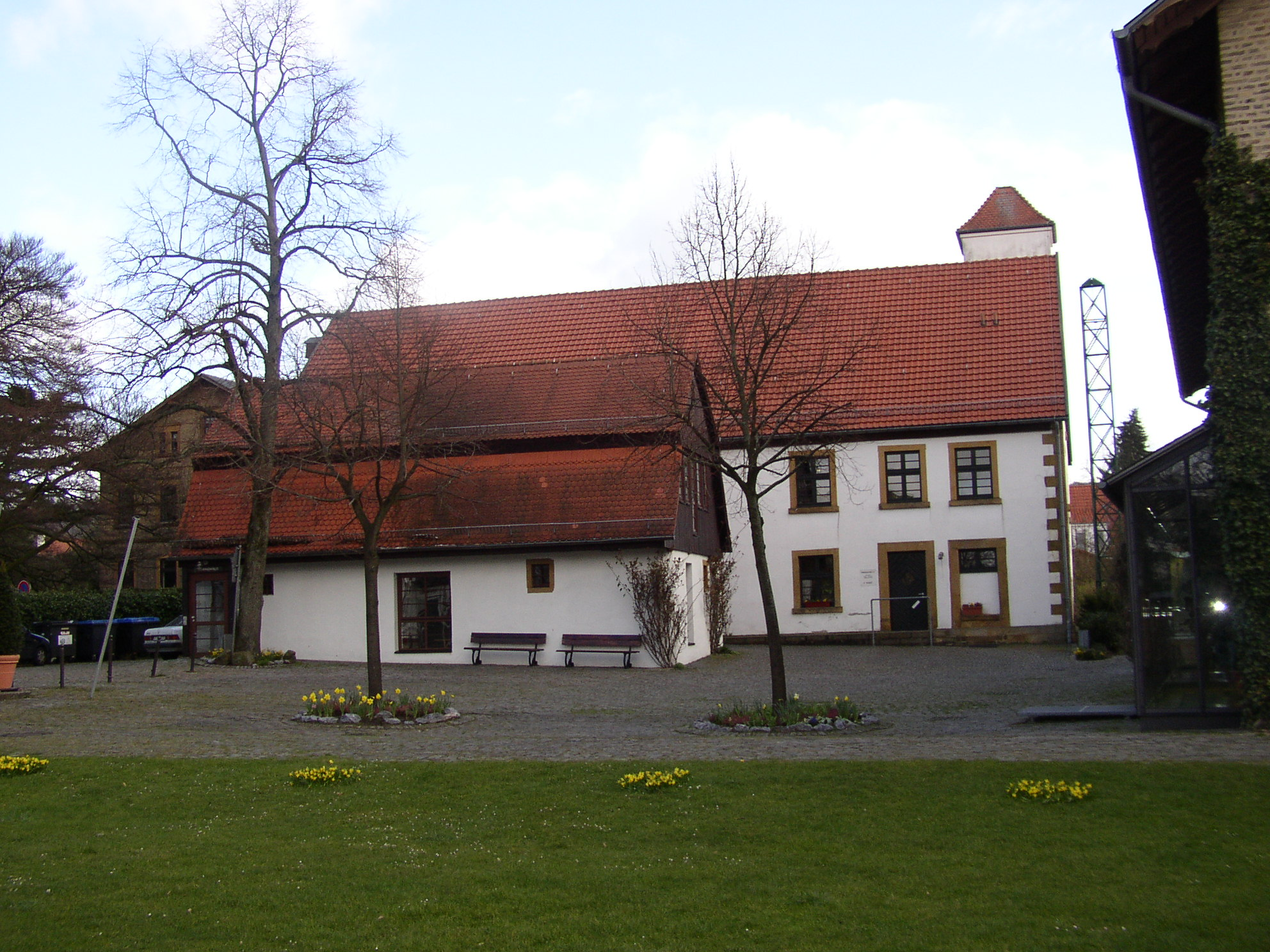 Kiskerhaus, Halle (Westfalen)